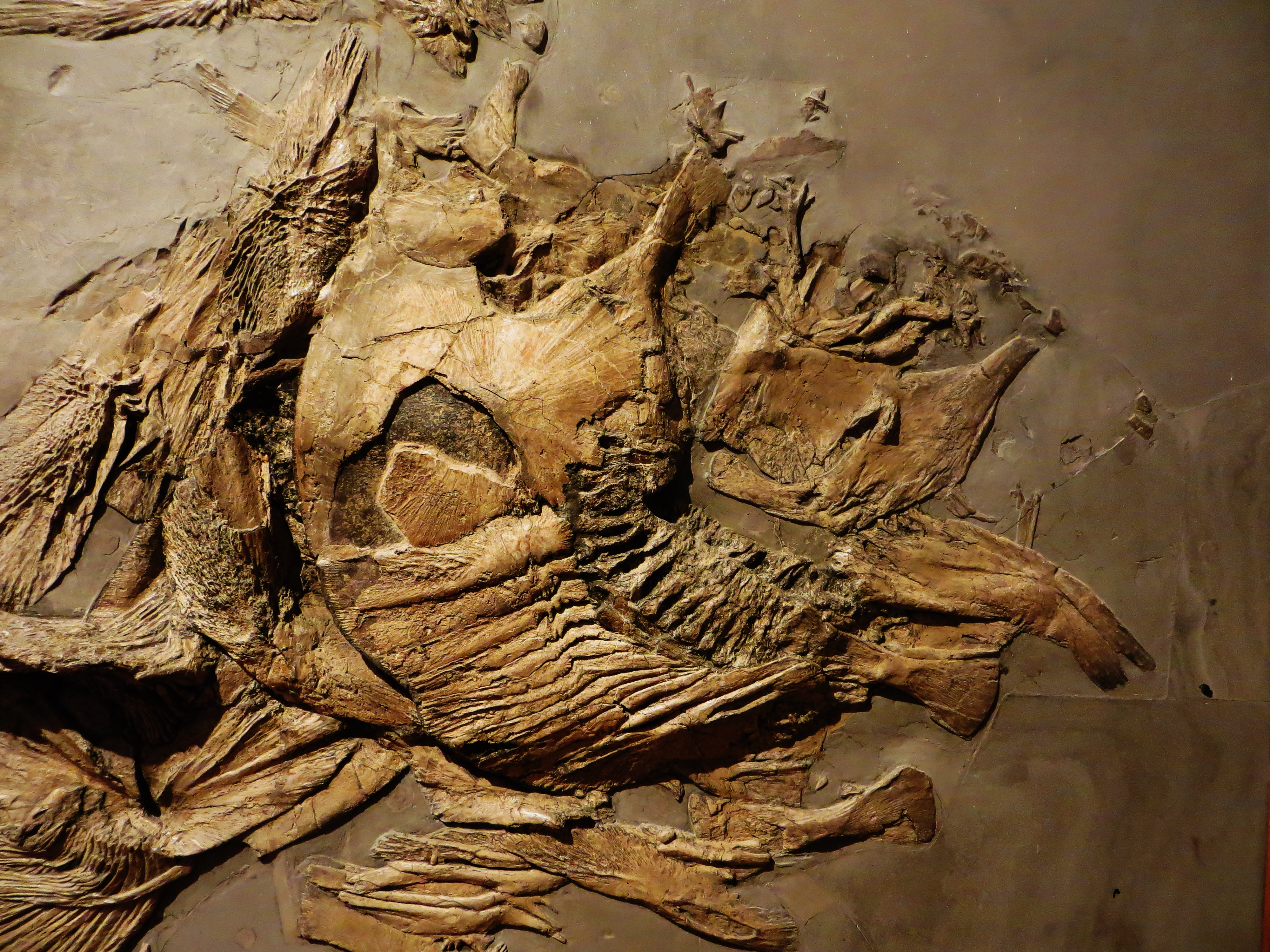 Fossil of Strongylosteus, an extinct fish- Took the picture at Museum of Paleontology, Tubingen